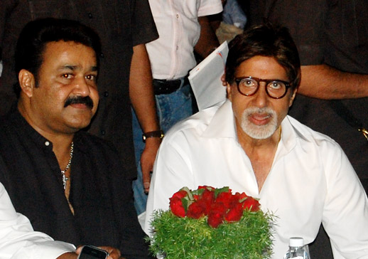 മോഹൻലാൽ അമിതാഭ് ബച്ചനോടൊപ്പം